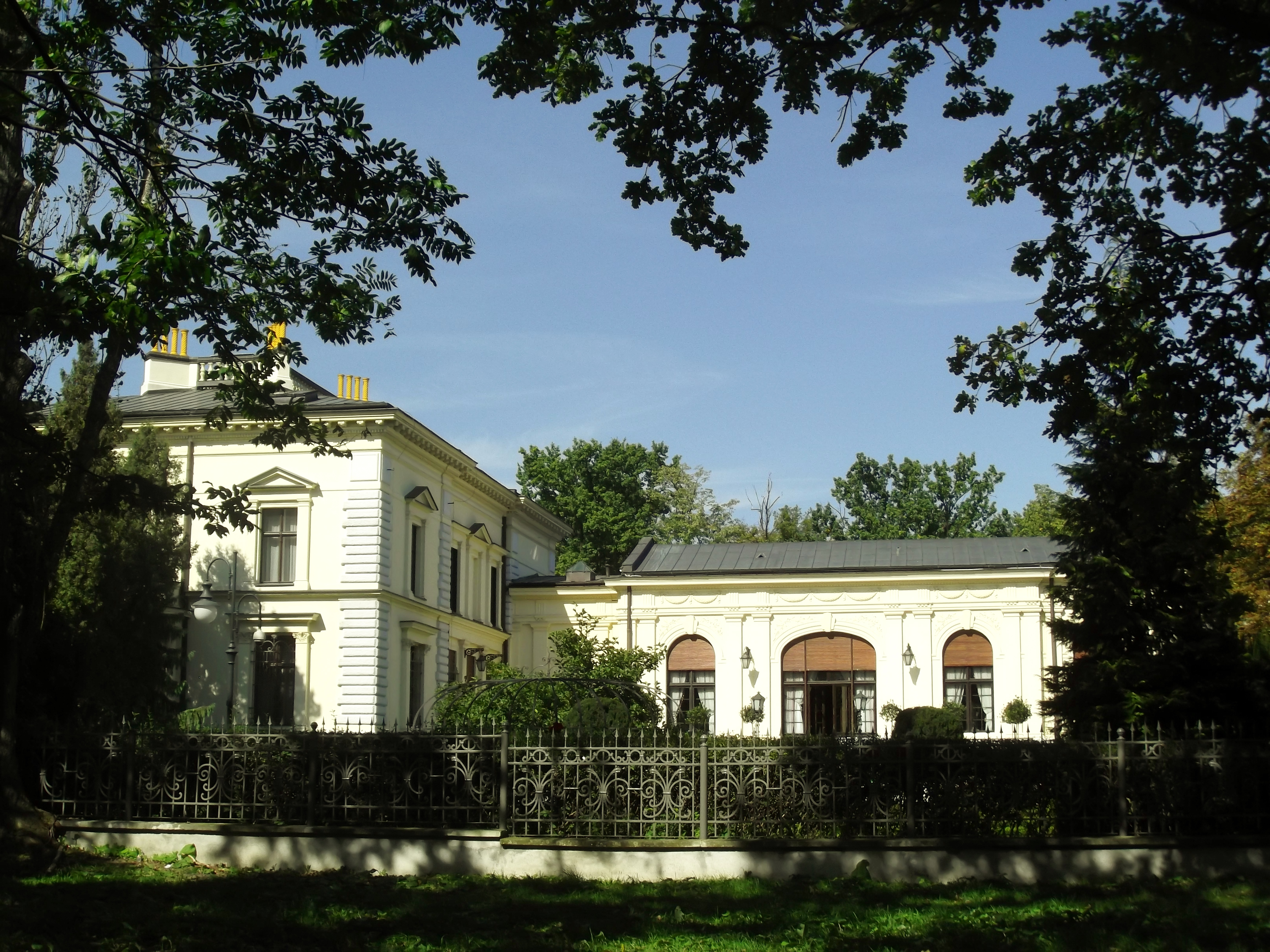 Łódź, pałac Edwarda Herbsta, 1873–1891